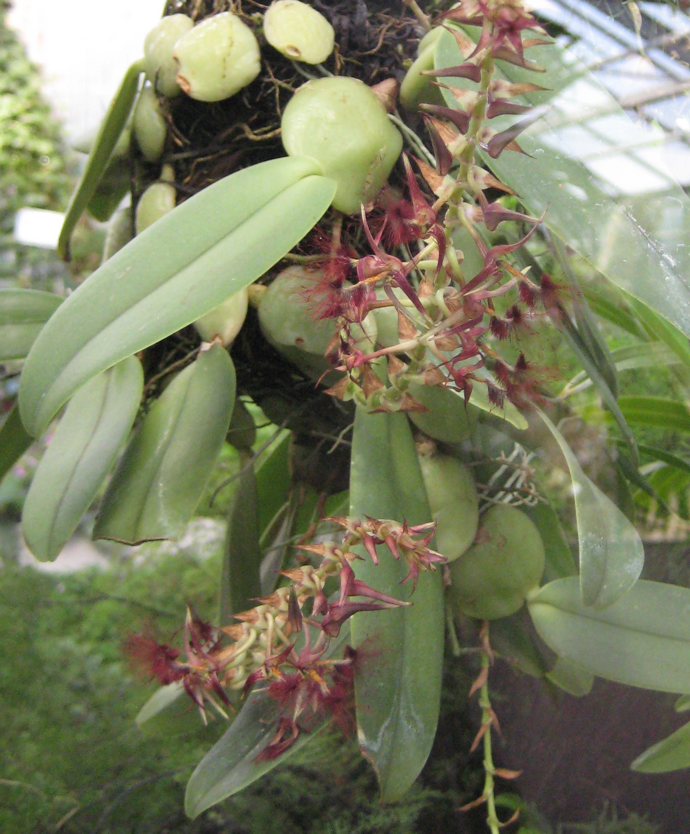 Bulbophyllum barbigerum im Botanischen Garten Dresden